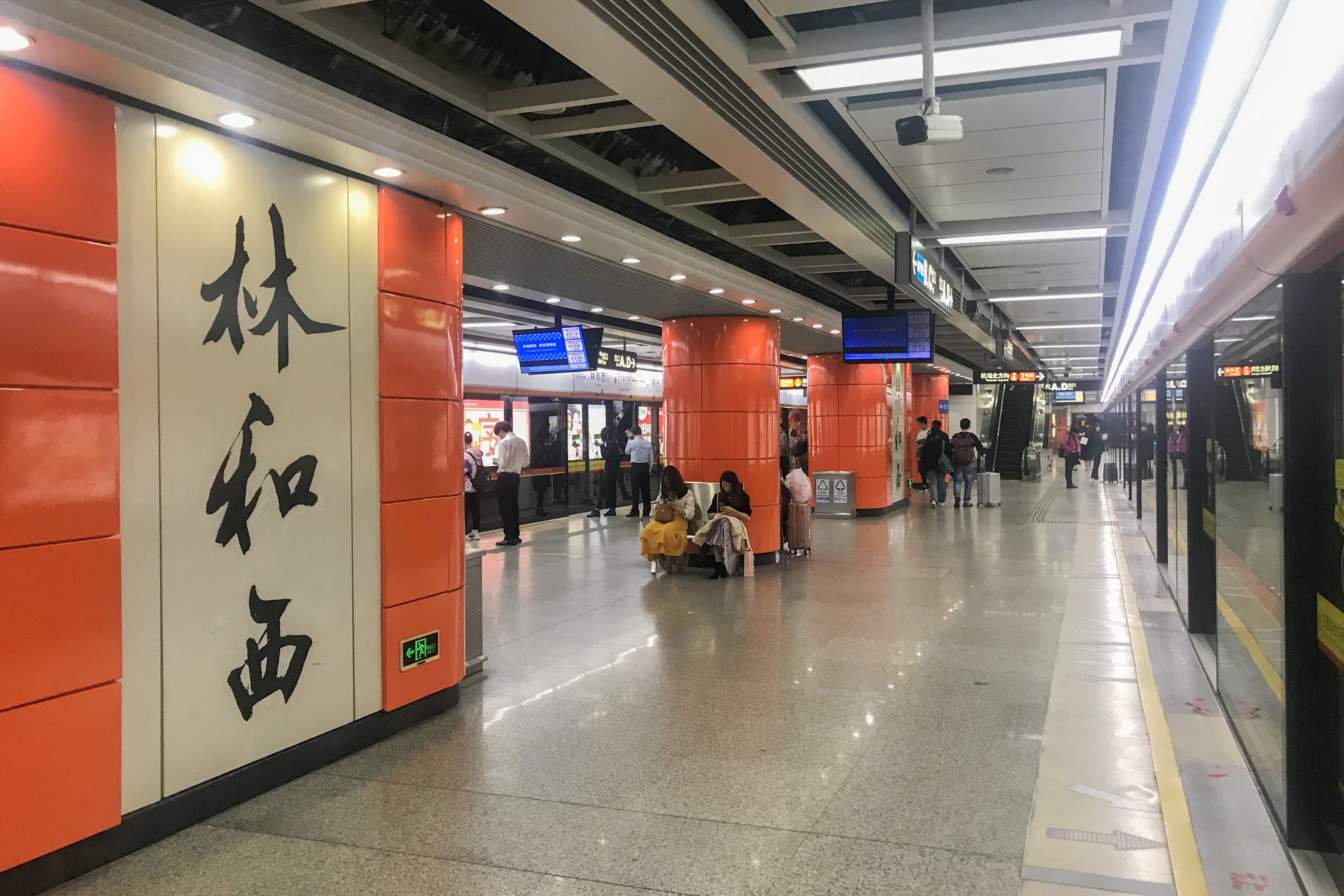 广州地铁林和西站